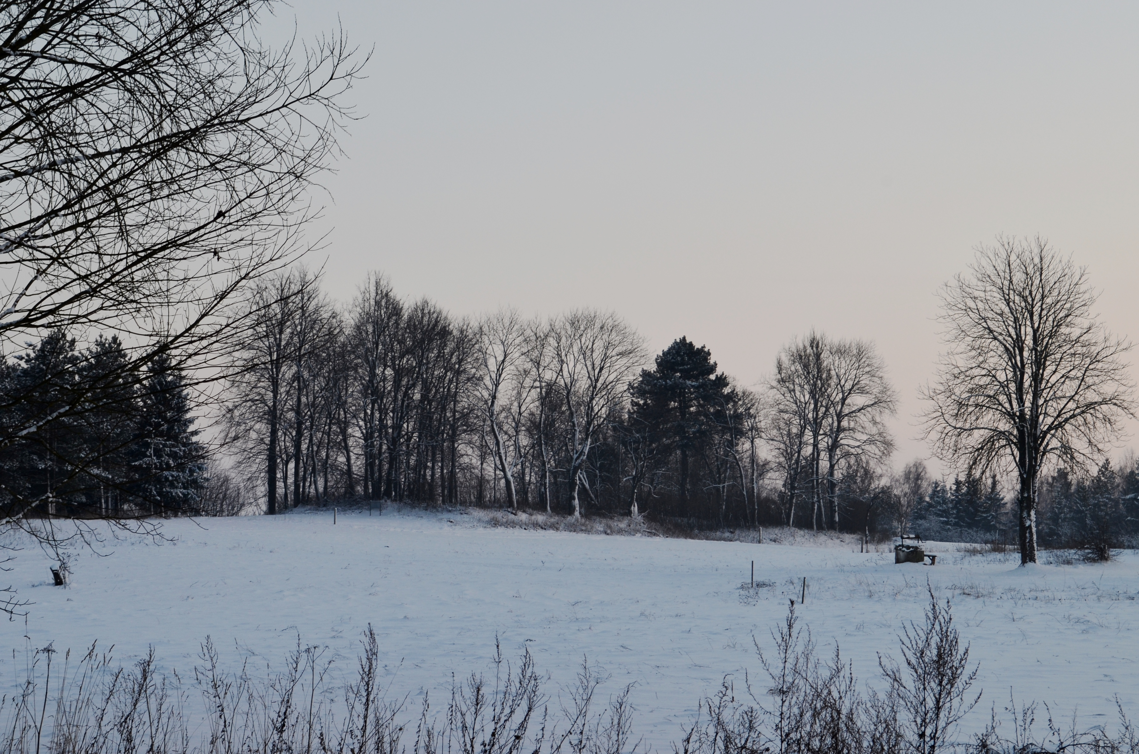 Senosios Kalnaberžės kapinės, Kėdainių raj.